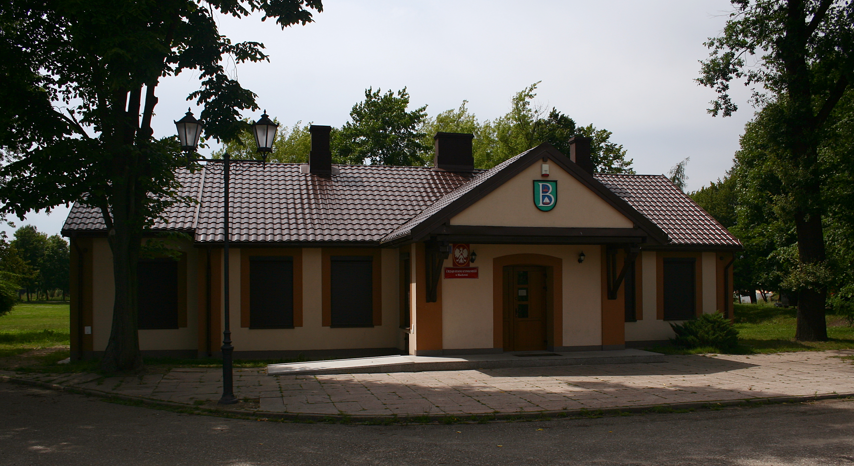 Urząd Stanu Cywilnego w Blachowni